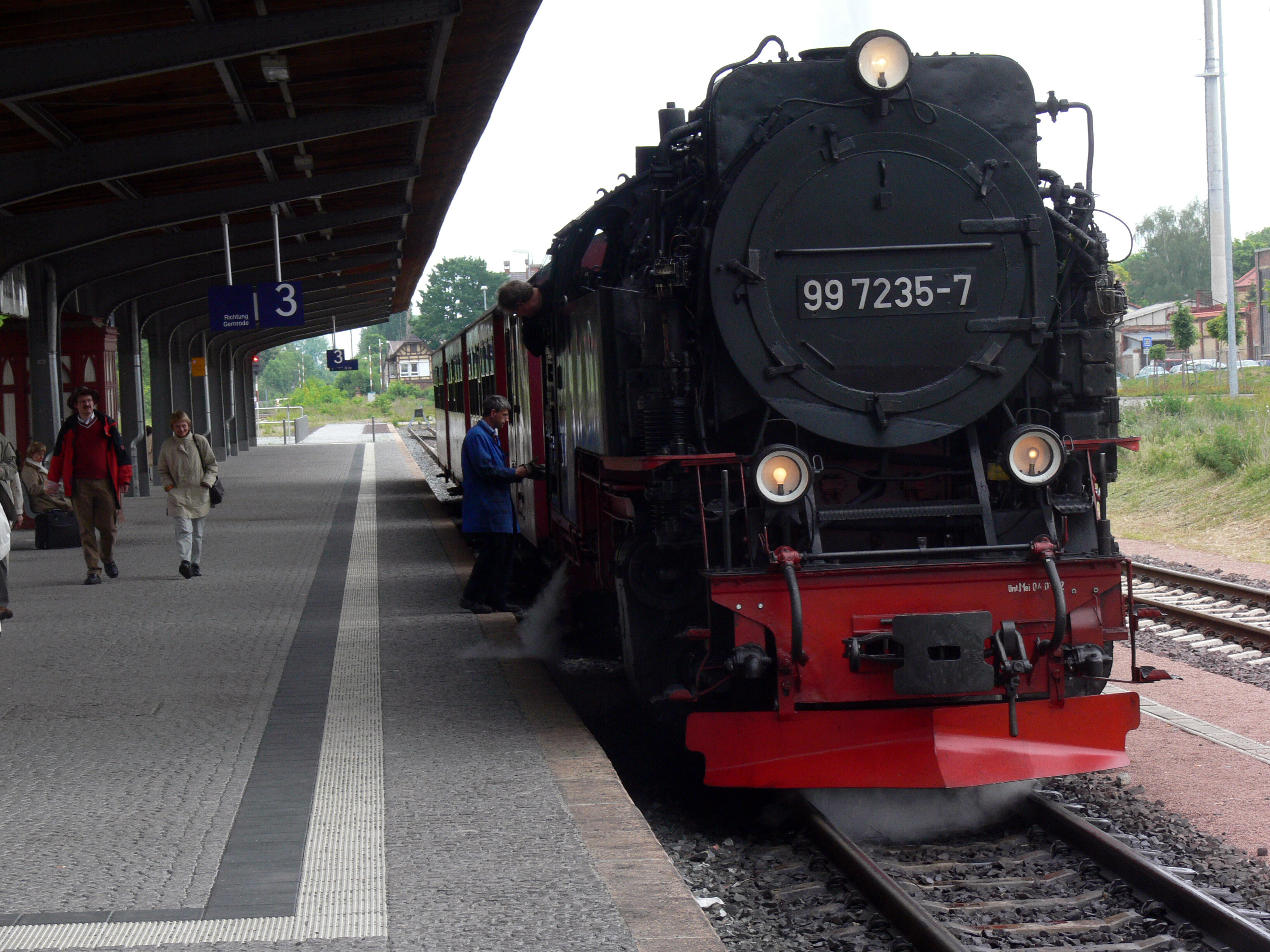 Harzer Schmalspurbahn im Bahnhof von Quedlinburg